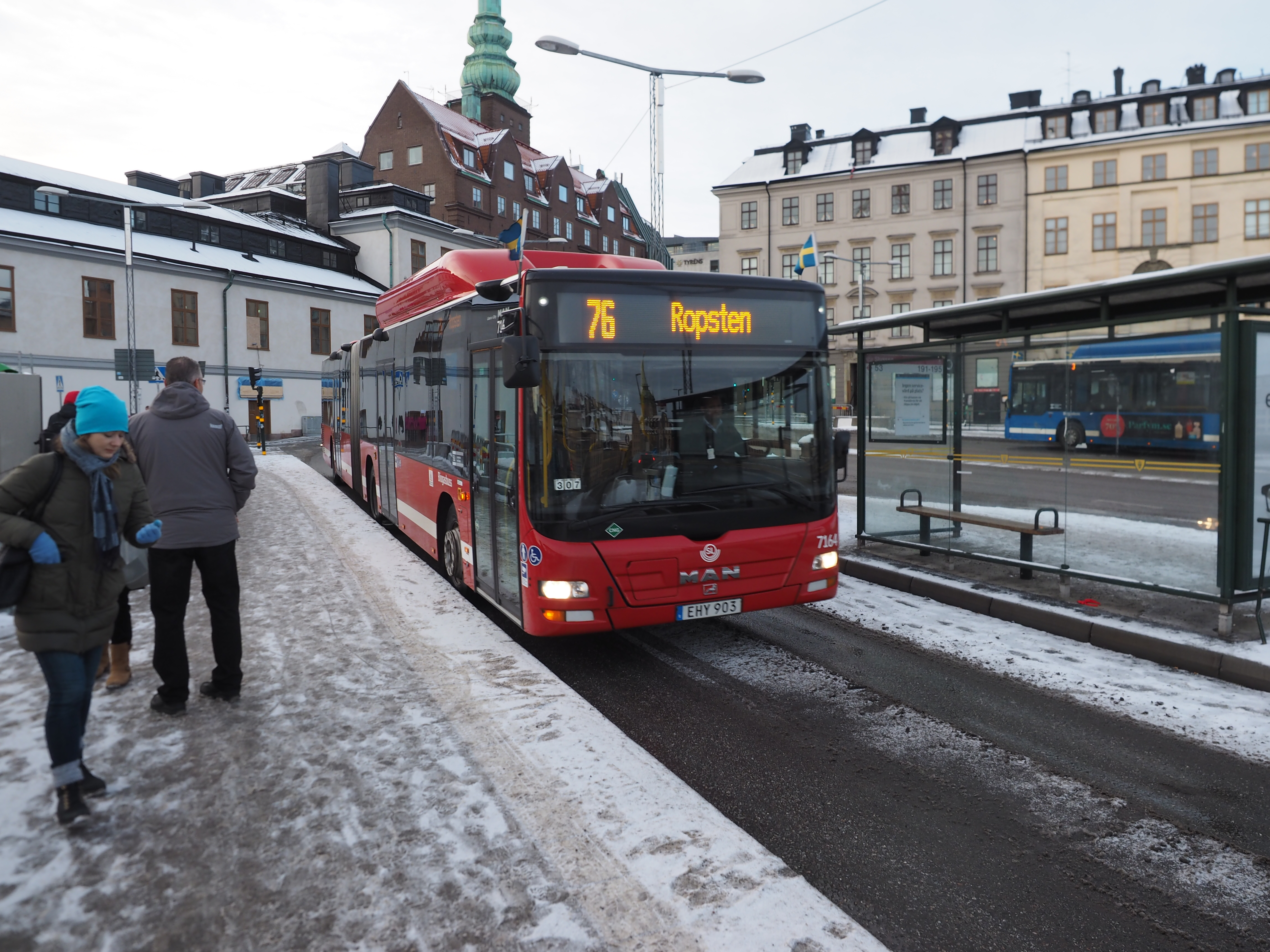 Stockholm bus 76 going to Ropsten in central Stockholm, Sweden.